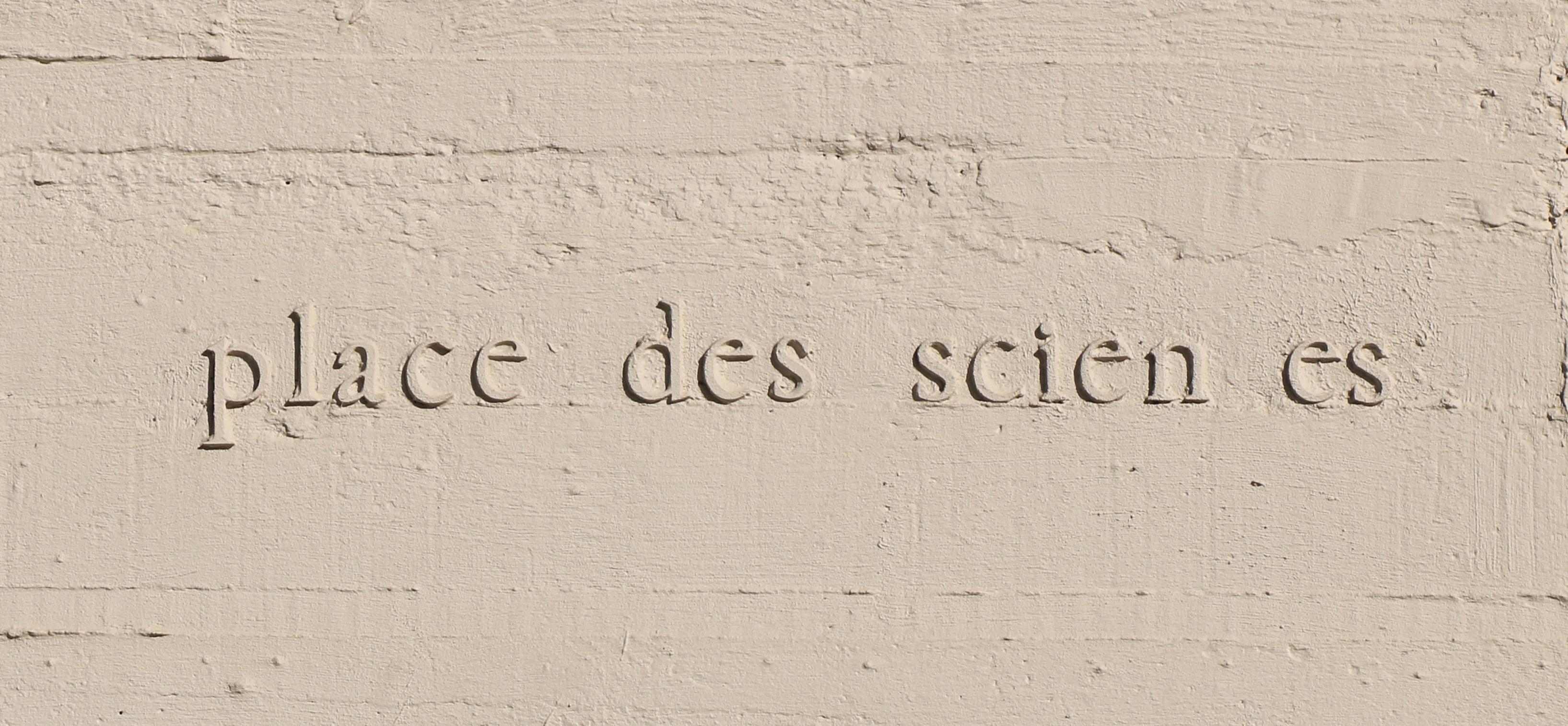 Belgique - Brabant wallon - Louvain-la-Neuve - Place des Sciences (architecture brutaliste - architecte André Jacqmain - 1972) This photo of immovable heritage has been taken in the Walloon Region